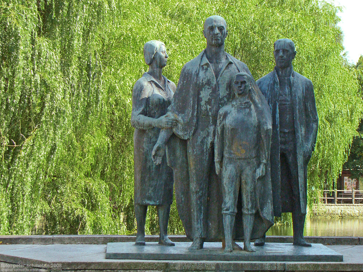 Mahnmal für Verfolgte des Naziregimes (1970) in Teterow